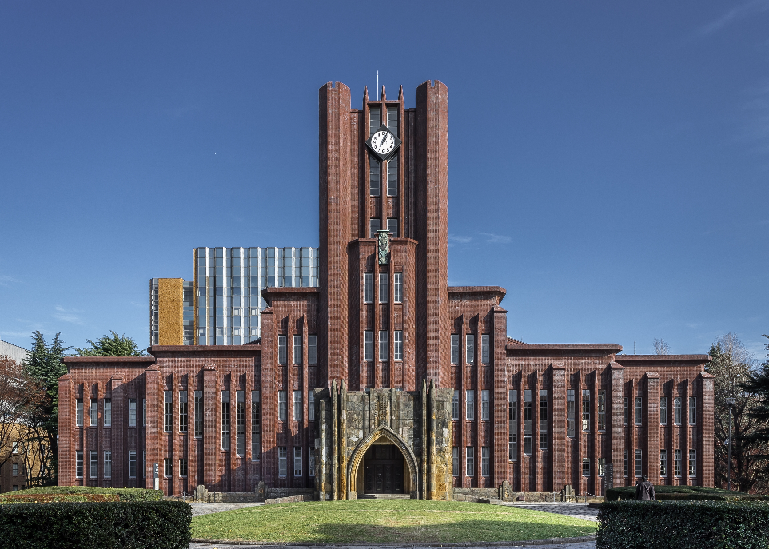 東京大学安田講堂、内田祥三（1925年）。